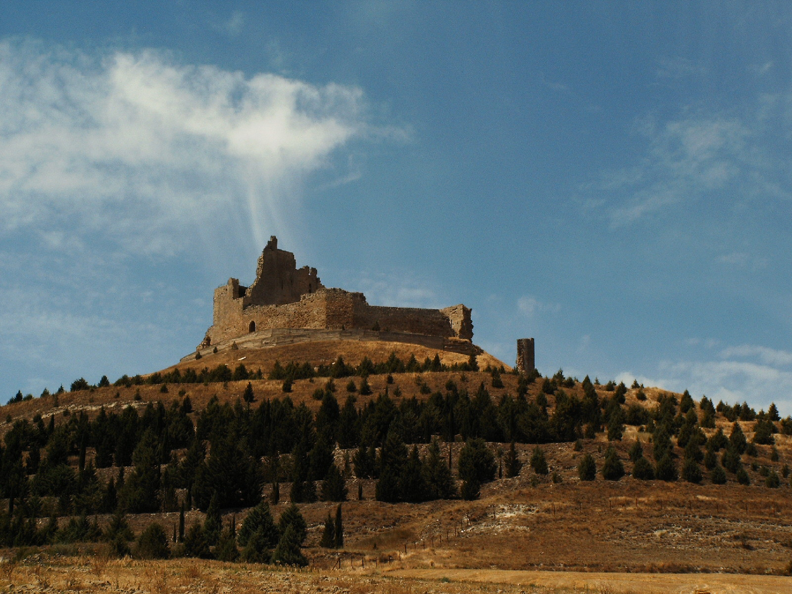 Ruinas del castillo de Castrojeriz (Burgos, España).